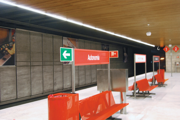 Estación de Autonomía de Renfe Cercanías - AdifEuskara: Renfe Aldiriak - Adif Autonomiako geltokia